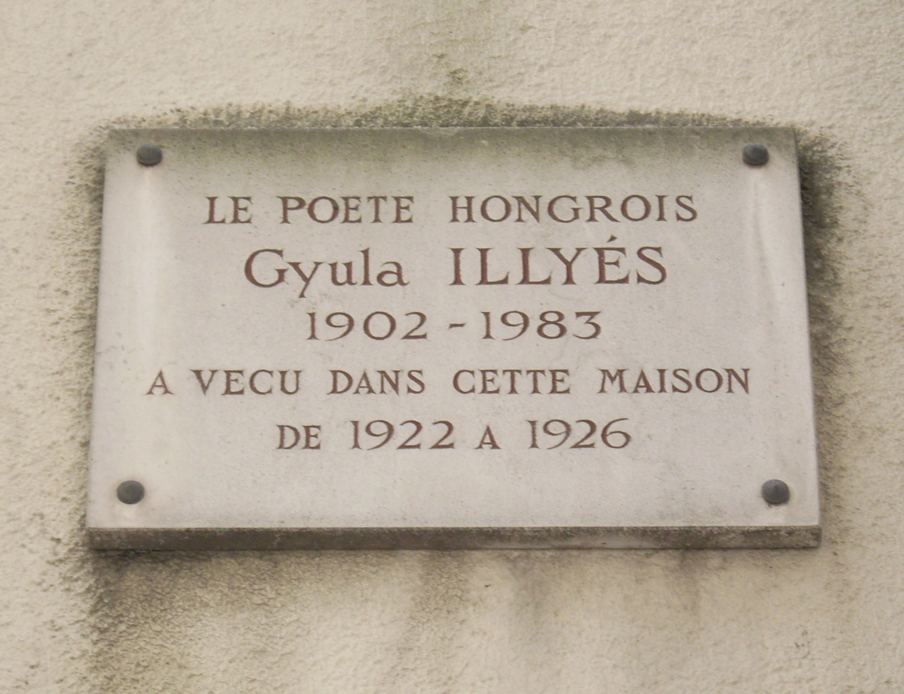 Plaque commémorative, 9 rue Budé, Paris 4e. « Le poète hongrois Gyula Illyés, 1902-1983, a vécu dans cette maison de 1922 à 1926.»